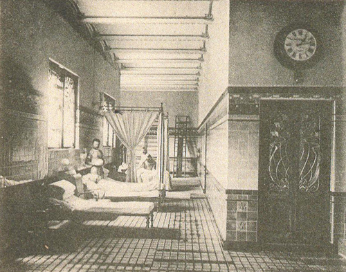 Szent Lukács gyógyfürdő, korabeli fürdőgyógyászati osztály